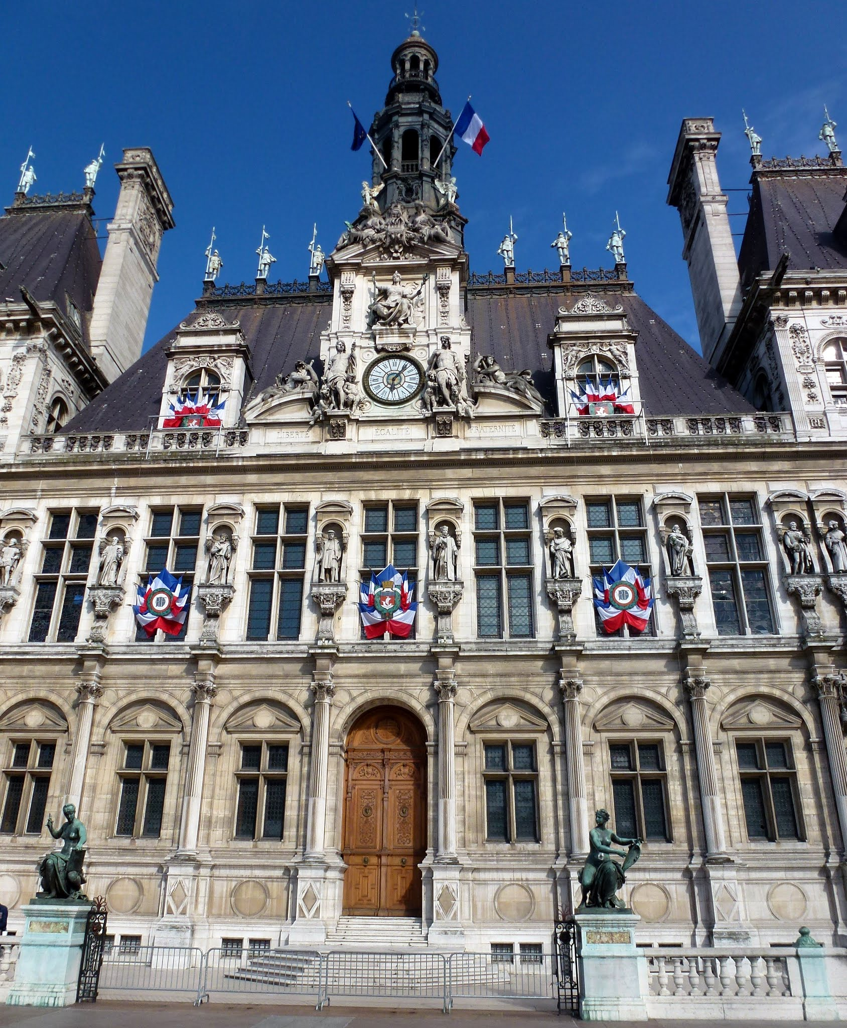 Hotel de Ville, Paris